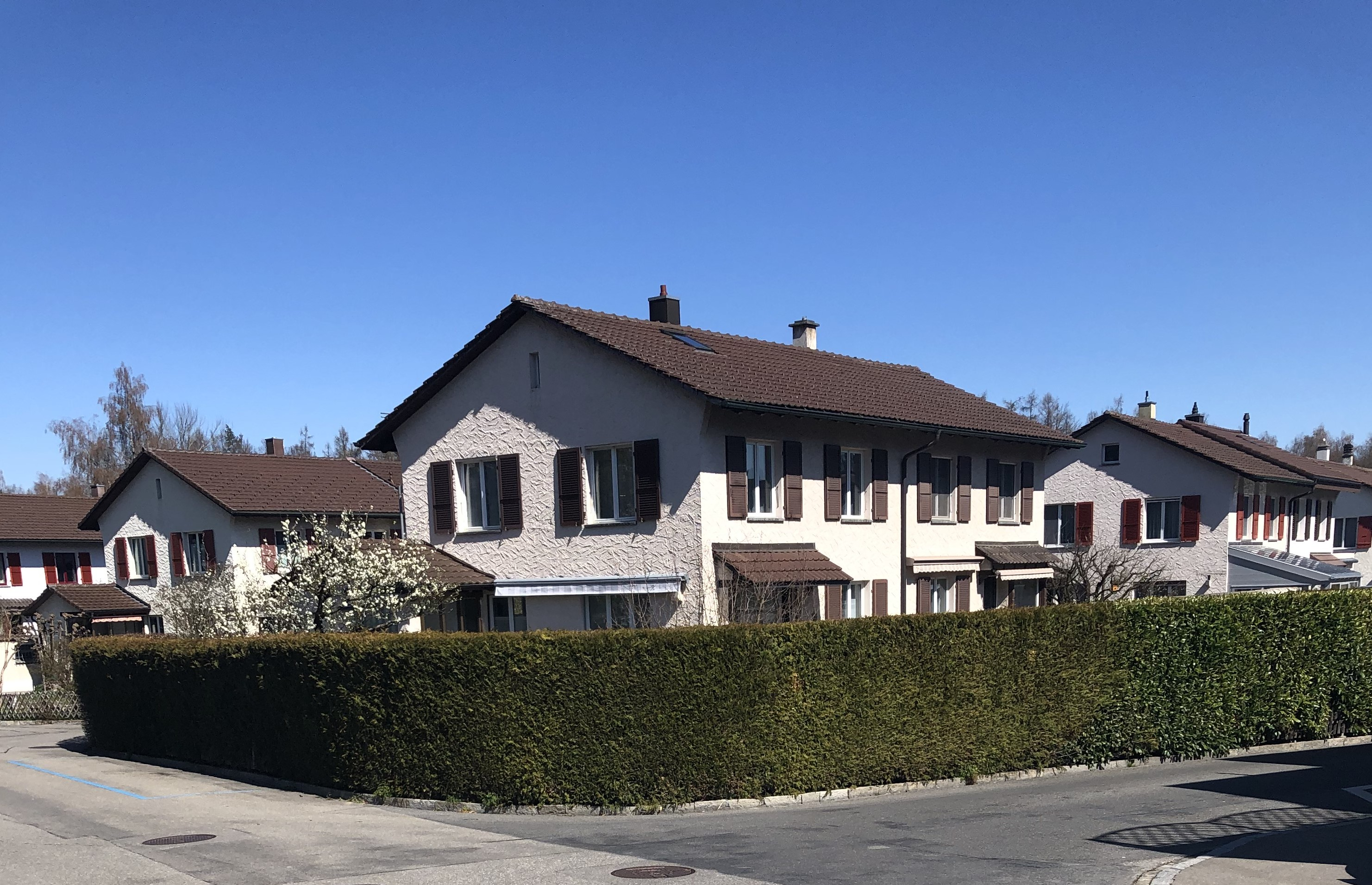 Altes Bethlehem Mehrfamilienhäuser